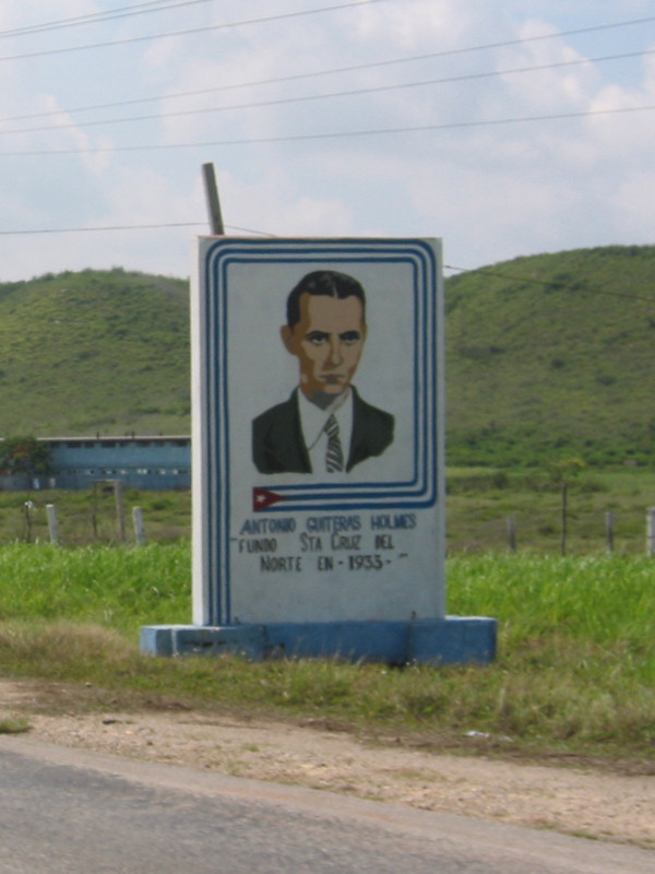 Roadside monument to Antonio Guiteras Holmes, Cuba.